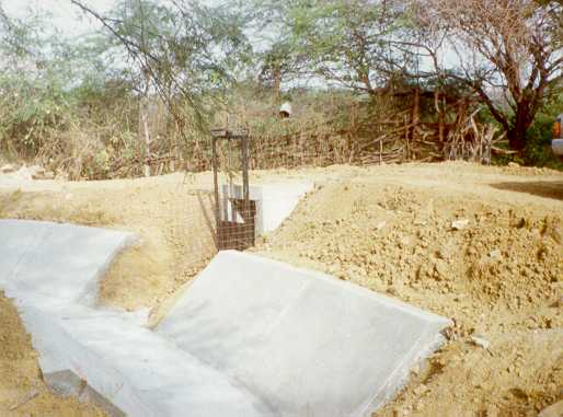 Obra de derivación en construcción Construcción de una derivación desde un canal de riego también en construcción Lugar: norte del Perú Autor: Alfredobi Fecha: aprox. 1999